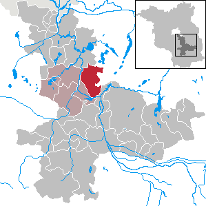 Münchehofe in Brandenburg (Country) - District Dahme-Spreewald